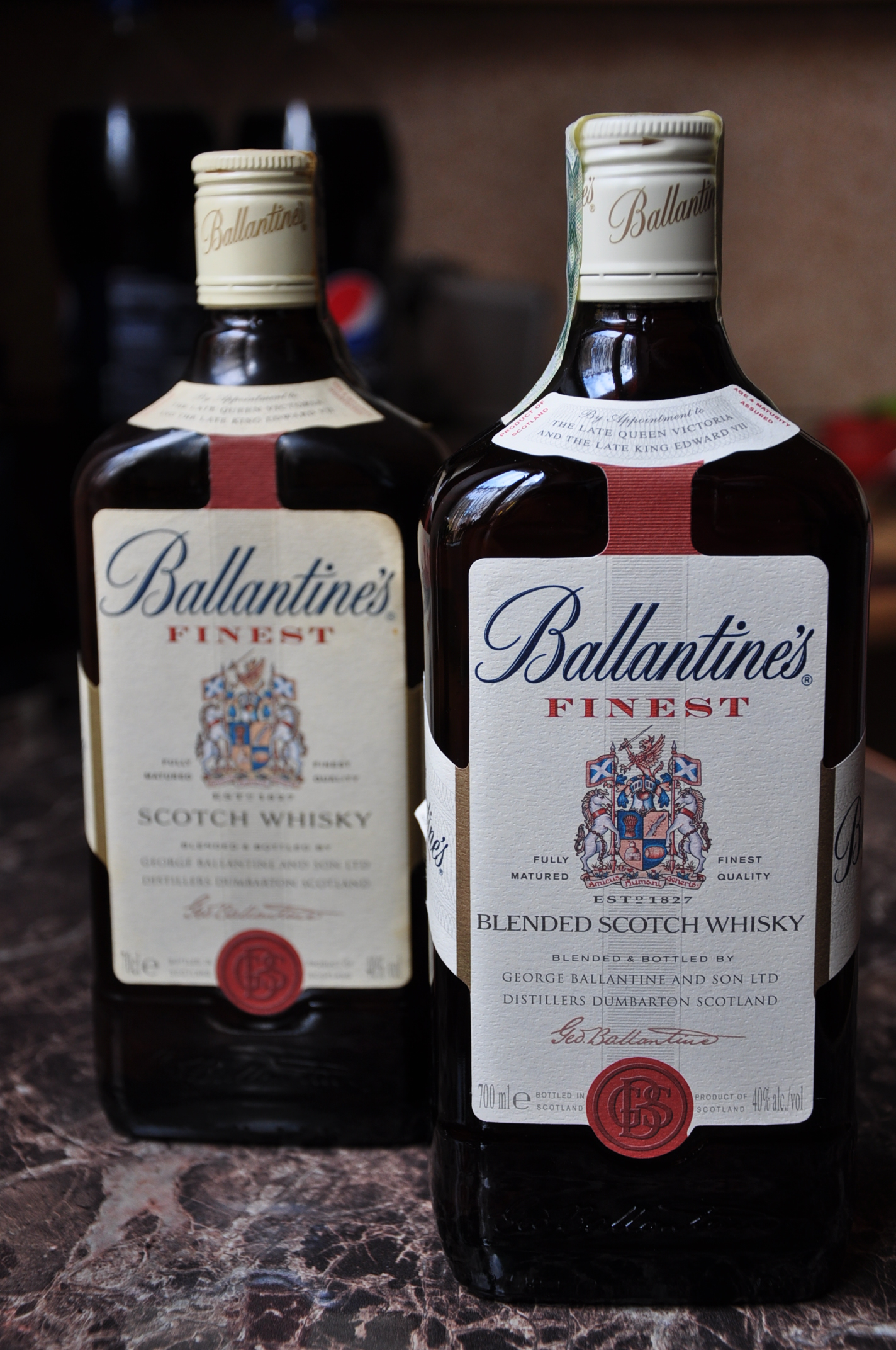 2 butelki 0,7l Ballantines, pierwsza z 2011 roku druga z 2001 roku.